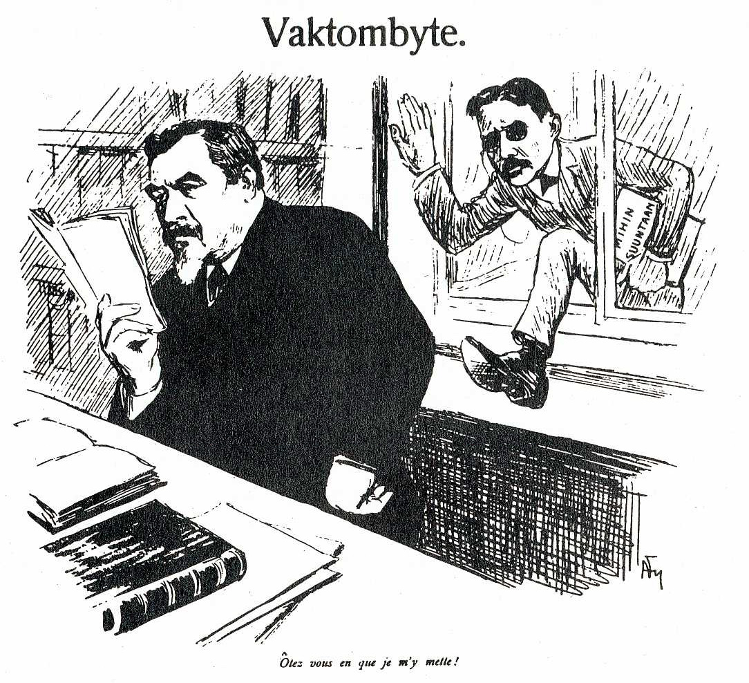 Fyren-lehden pilakuva J. R. Danielsonin nimityksestä Th. Reinin tilalle Helsingin keisarillisen yliopiston sijaiskansleriksi. Piirros on parodia Magnus Enckellin maalaamasta Reinin muotokuvasta. Ôtez vous en que je m'y mette! ("Siirtykää syrjään, jotta pääsen sijallenne") oli ollut J. V. Snellmanin käyttämä ranskankielinen iskulause. Mihin suuntaan oli Danielsonin vuotta aiemmin julkaisema kirja.